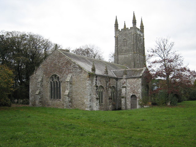 St Erme church